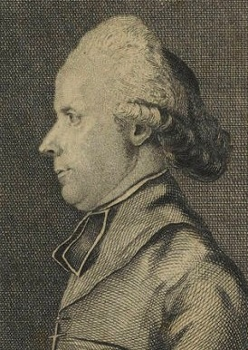 Antoine-Adrien Lamourette (1742-1794), konstitutioneller Bischof des Departements Rhône-et-Loire